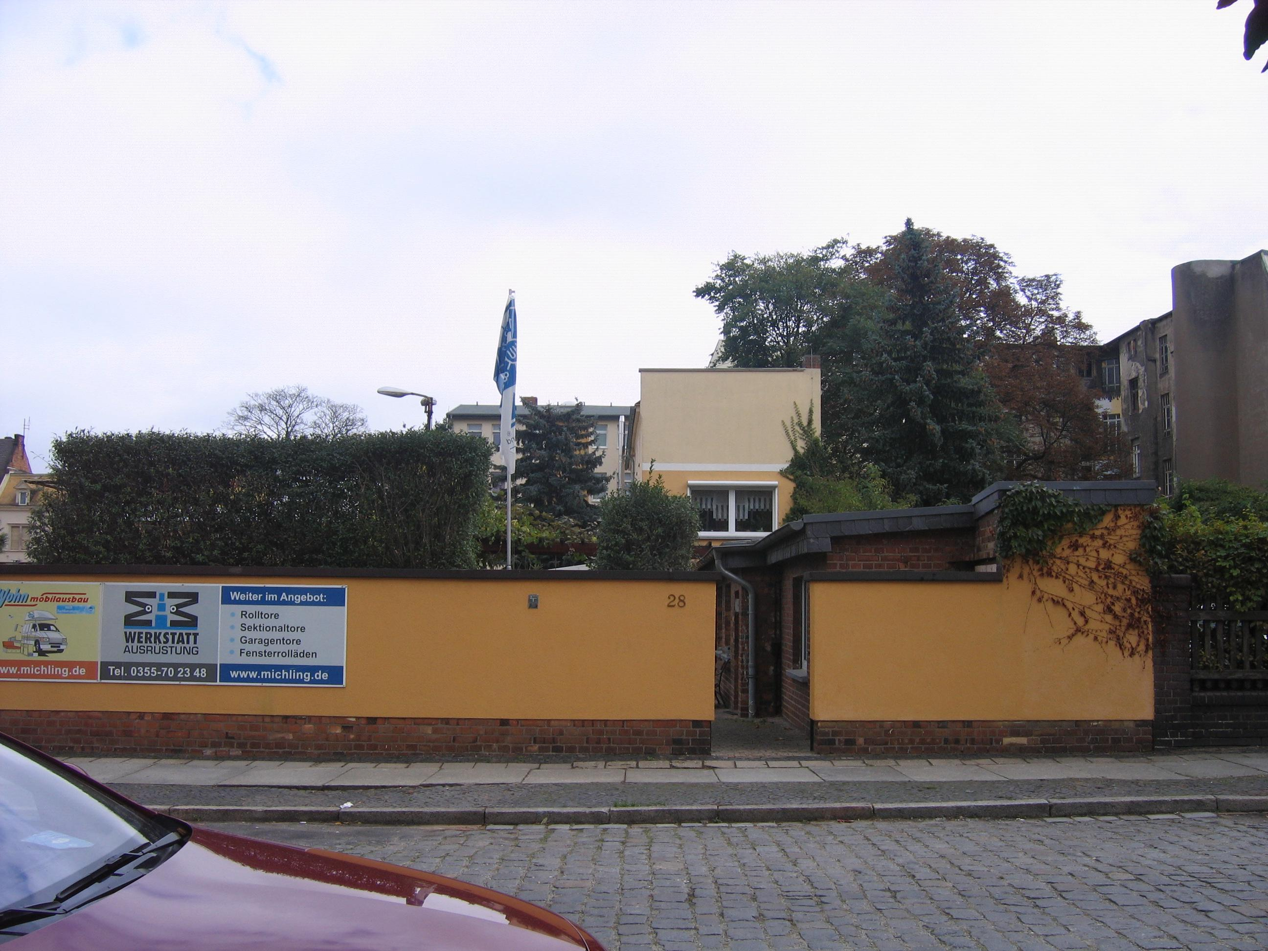 Wernerstraße 28